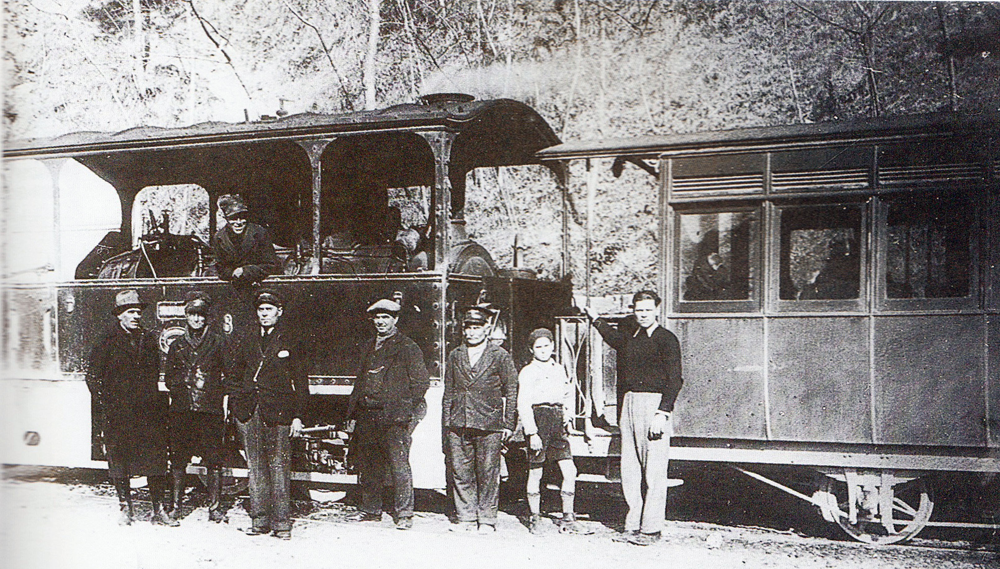 Personale in servizio sulla tranvia del chianti: sulla locomotiva il fuochista Cesare Barucci,. Poi da sinistra a desta: Giovanni Furini macchinista, signor Occupati macchinista, il capotreno Voltinsù, il signor Filipponi della squadra rialzo, il cosiddetto Furbino, e il bottegaio Geolino Marconi.